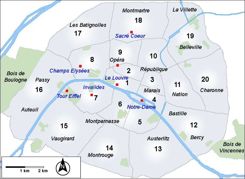 Description : Carte de Paris avec ses arrondissements Place : Paris, France Date : Août 2006 Author : Réalisation Pline